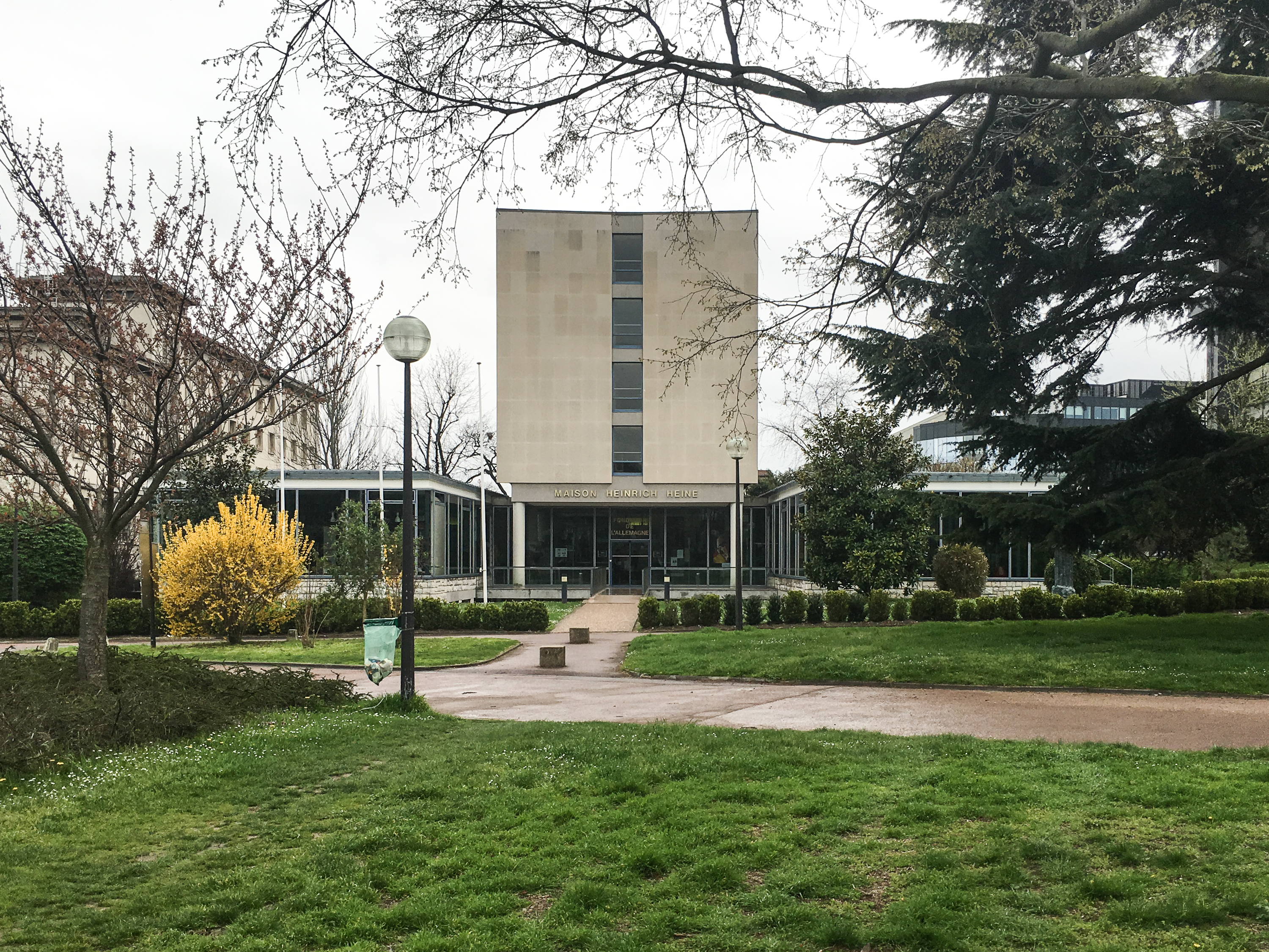 Maison Heinrich Heine, Paris, 4. April 2016.